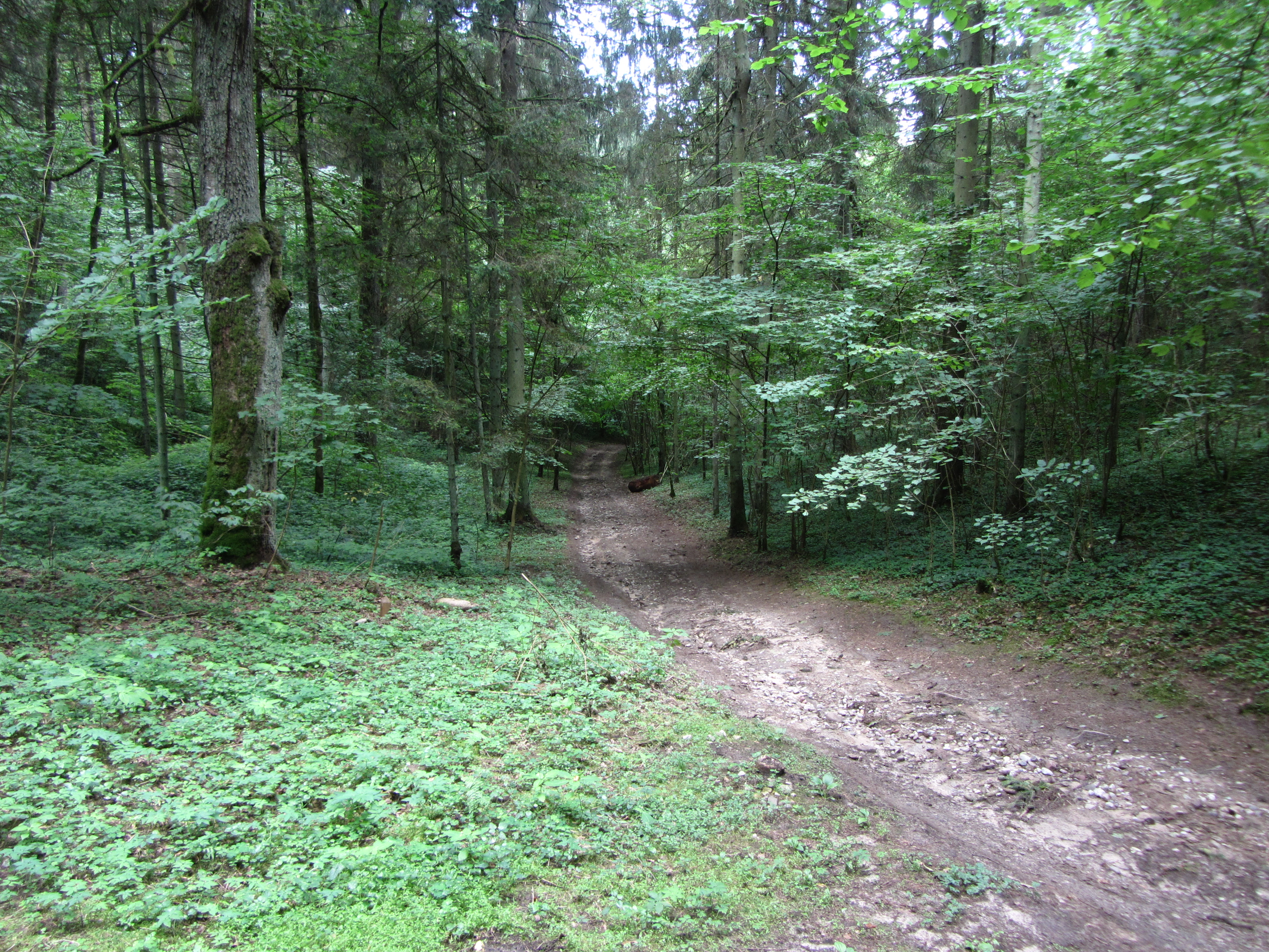 Paneriai, Vilnius, Lithuania